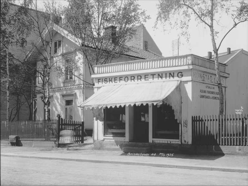 Hunstad & Co fiskeforretning i Briskebyveien 44 anno 1925